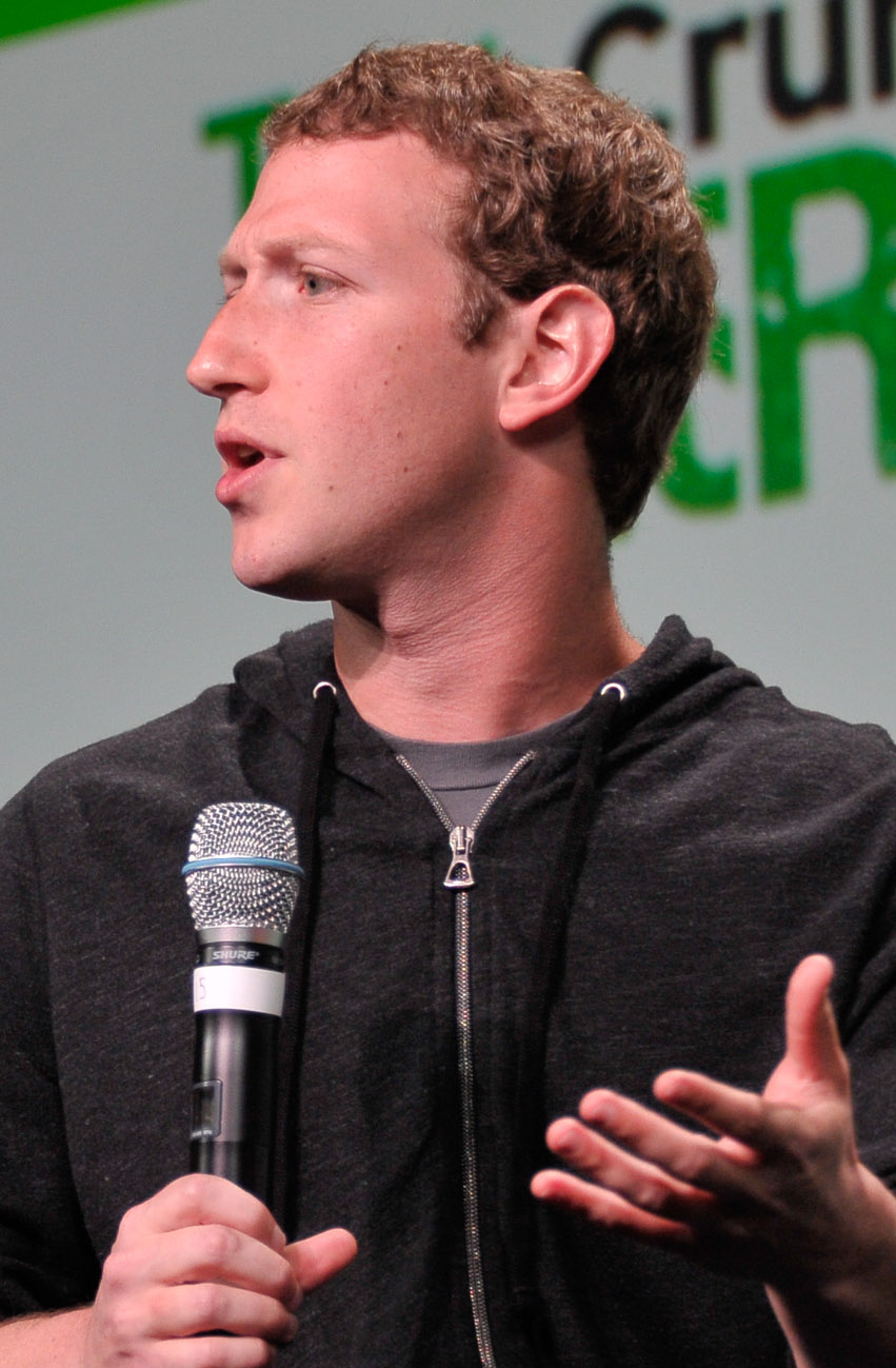 _SJP3318